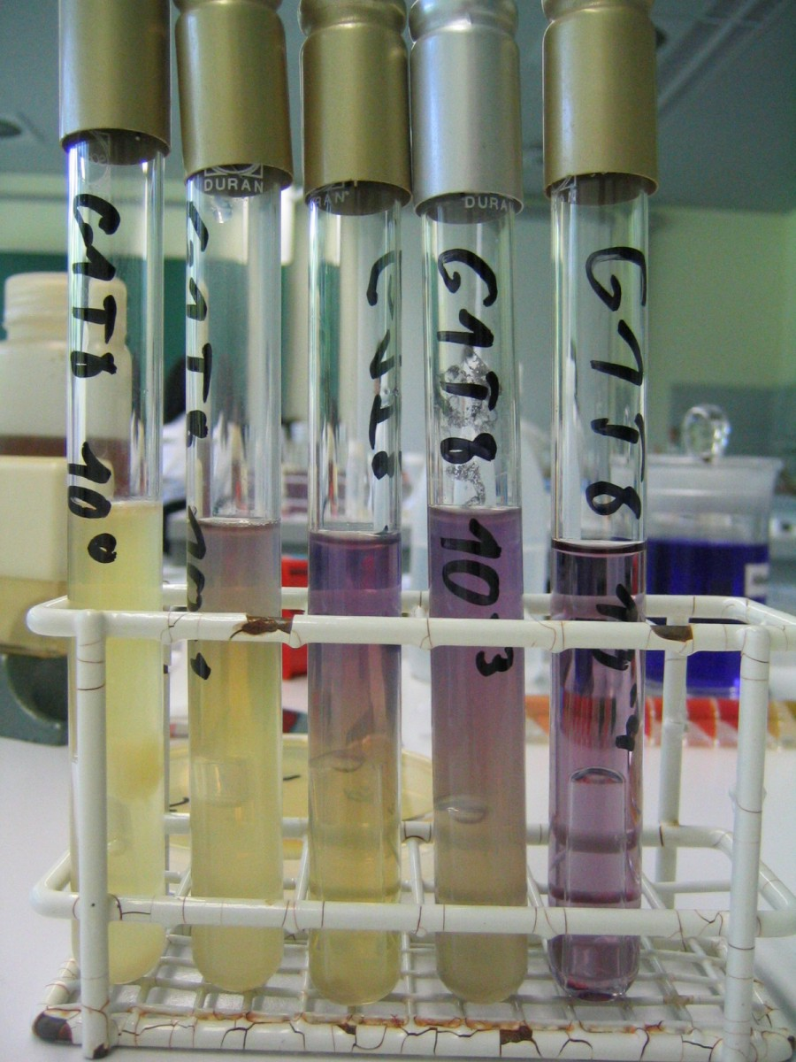 Colititer einer Gewässerprobe mit Lactose-Pepton-Bouillon mit Durham-Gärröhrchen (1000 bis 9999 KBE/ml)